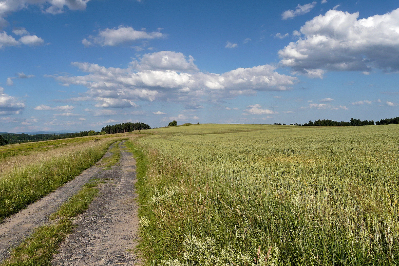 Cesta na Zourovský vrch.